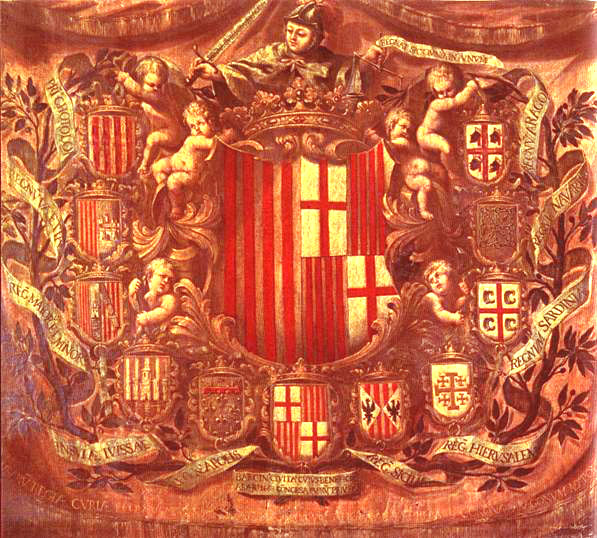 Apoteosi heràldica de Barcelona 1668-1681. Pintura sobre tela. REGNA SUBIECTA ARAGON REGNAT SICMNIA UN UNUM